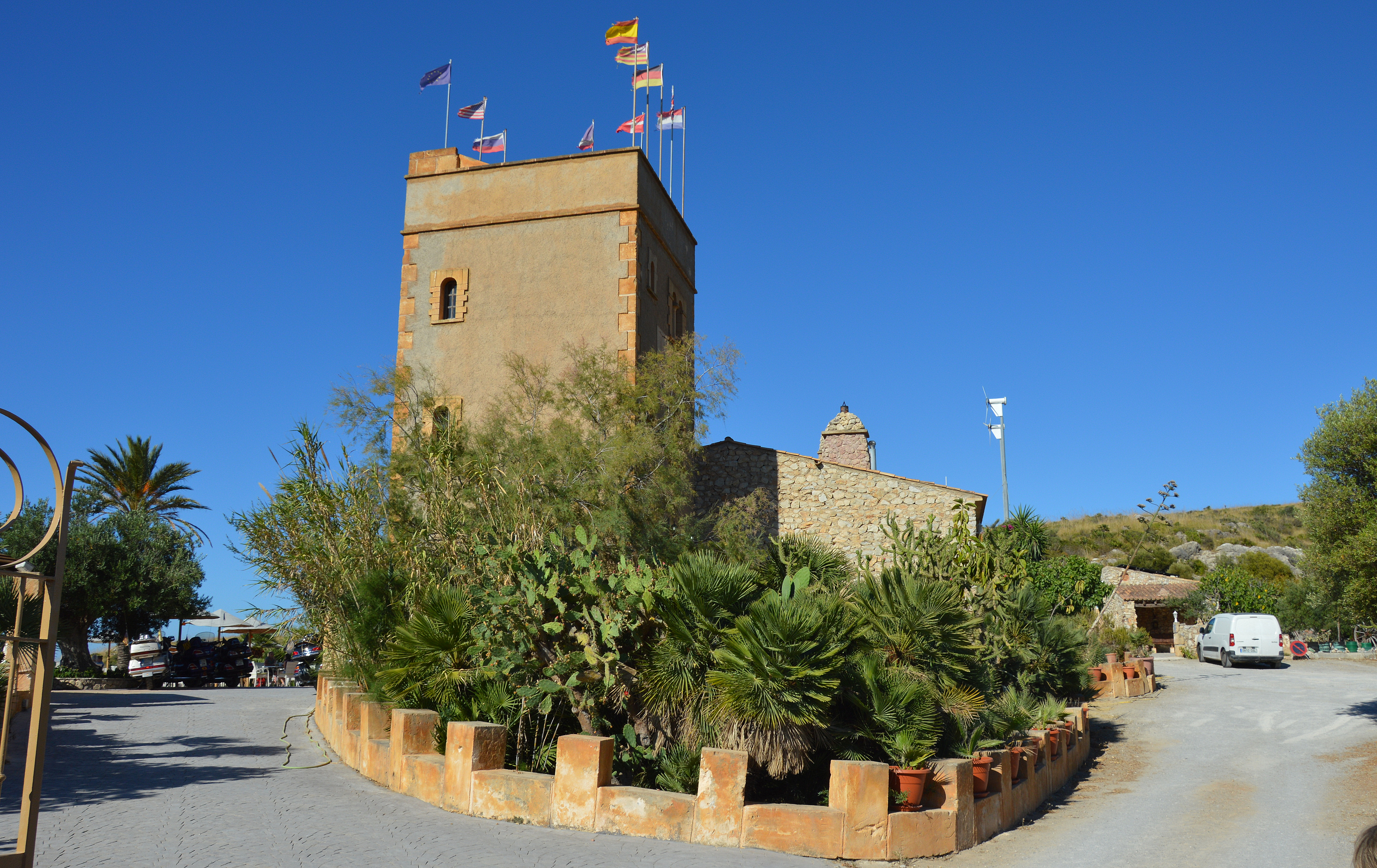 Sa Duaia bei Arta